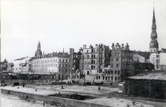 No RKBA 1919. gada oktobrī sagrautie nami 19. novembrī. K. Aksela foto. LVKFFDA, inv. Nr. 46626–N.